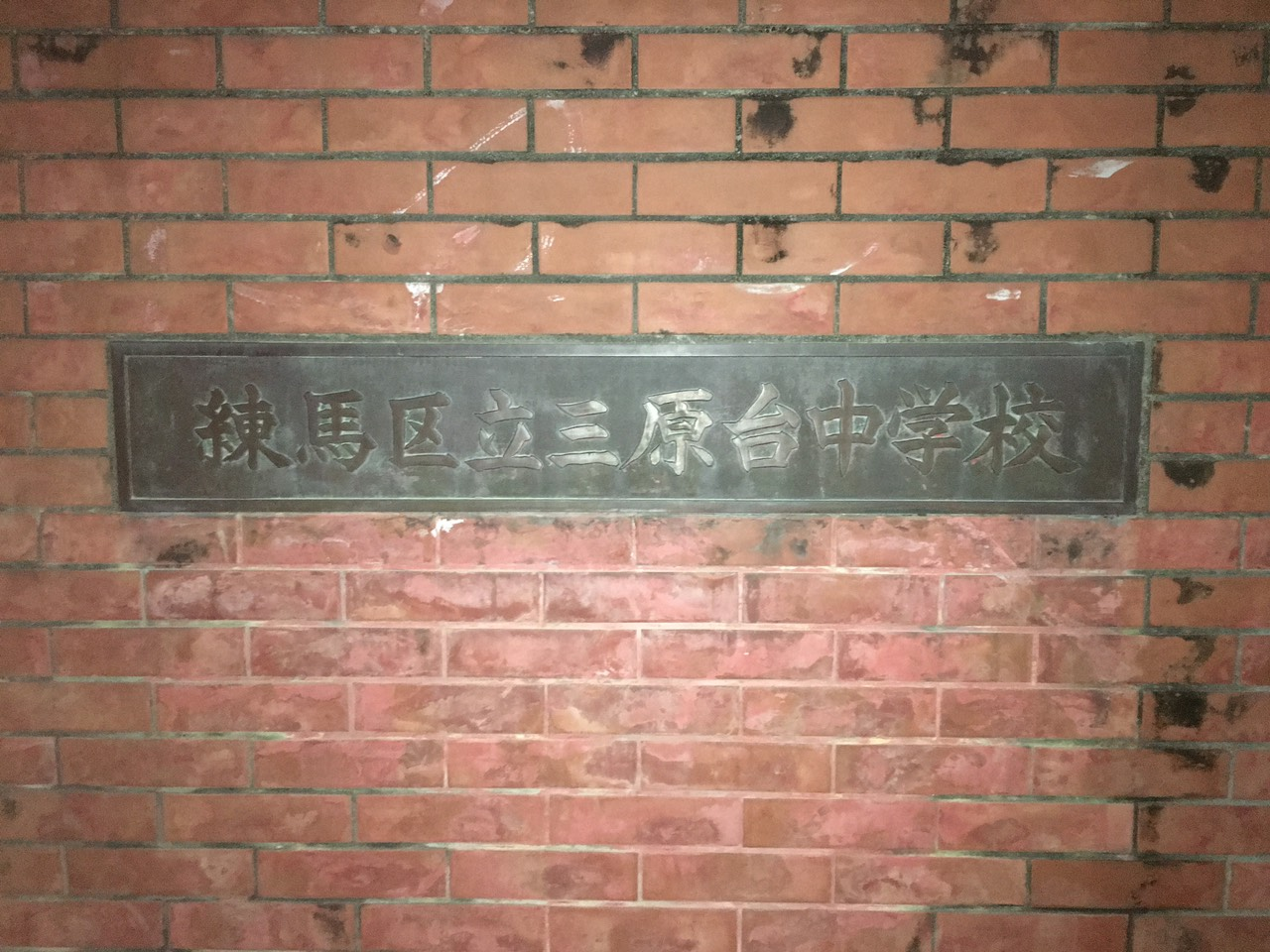 練馬区立三原台中学校の正門前のプレート